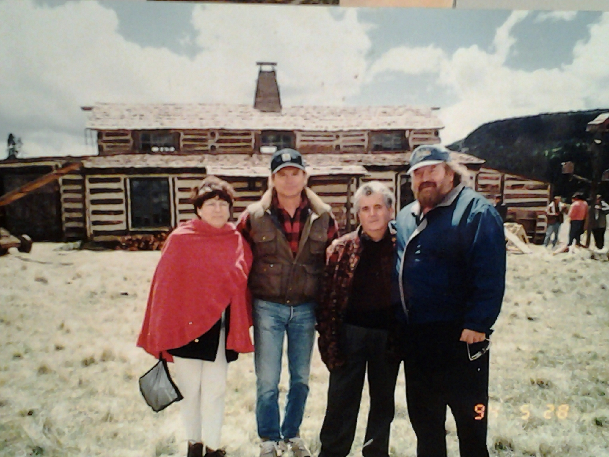 Io Terence Bud e Silvana